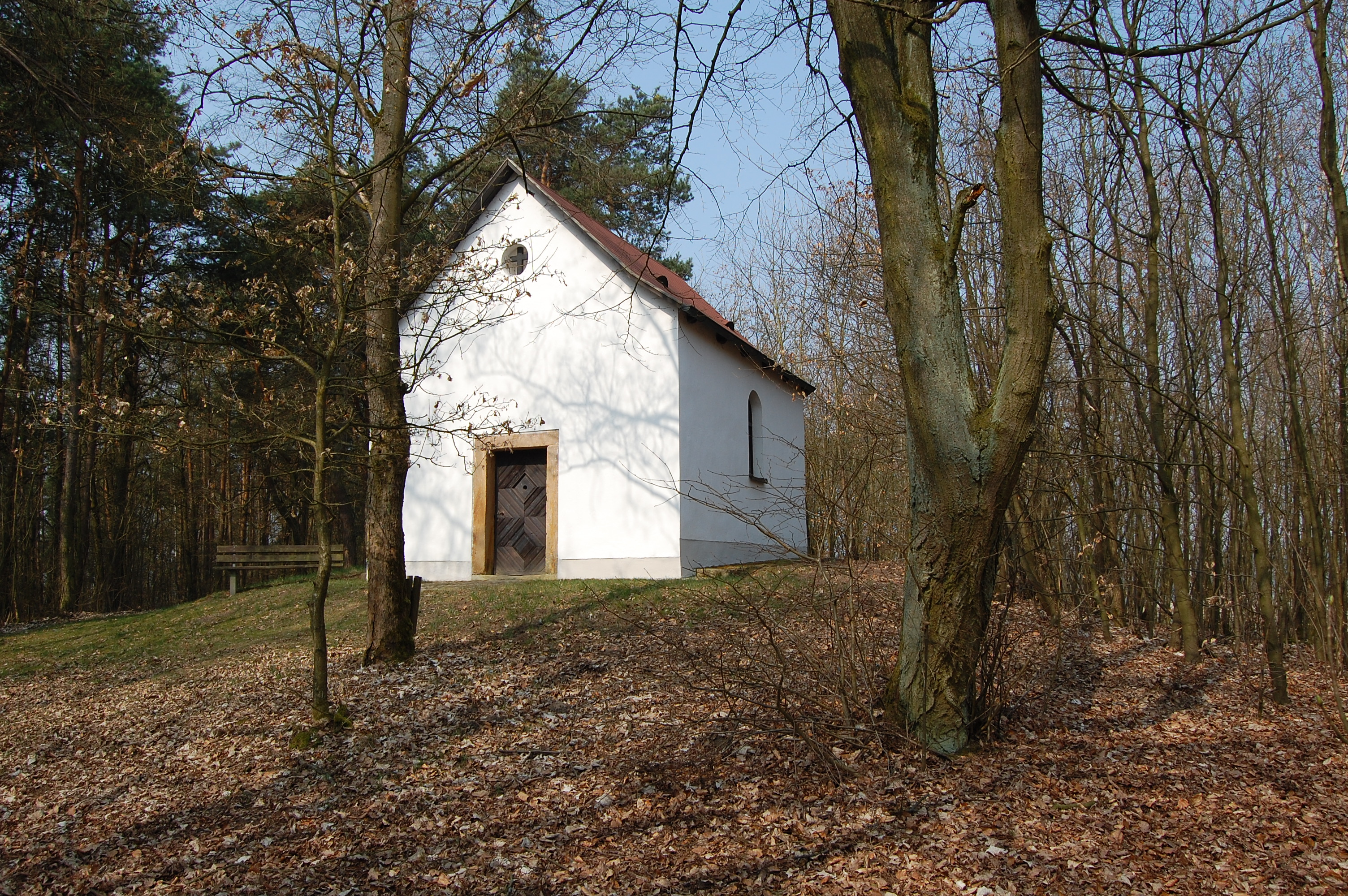 Kalvarienbergkapelle auf dem Pösinger "Bierl"